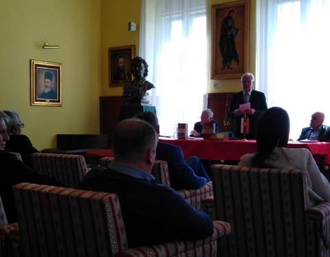 akademik.prof.dr Nenad Vunjak predavanje u Somboru 22.3.2019